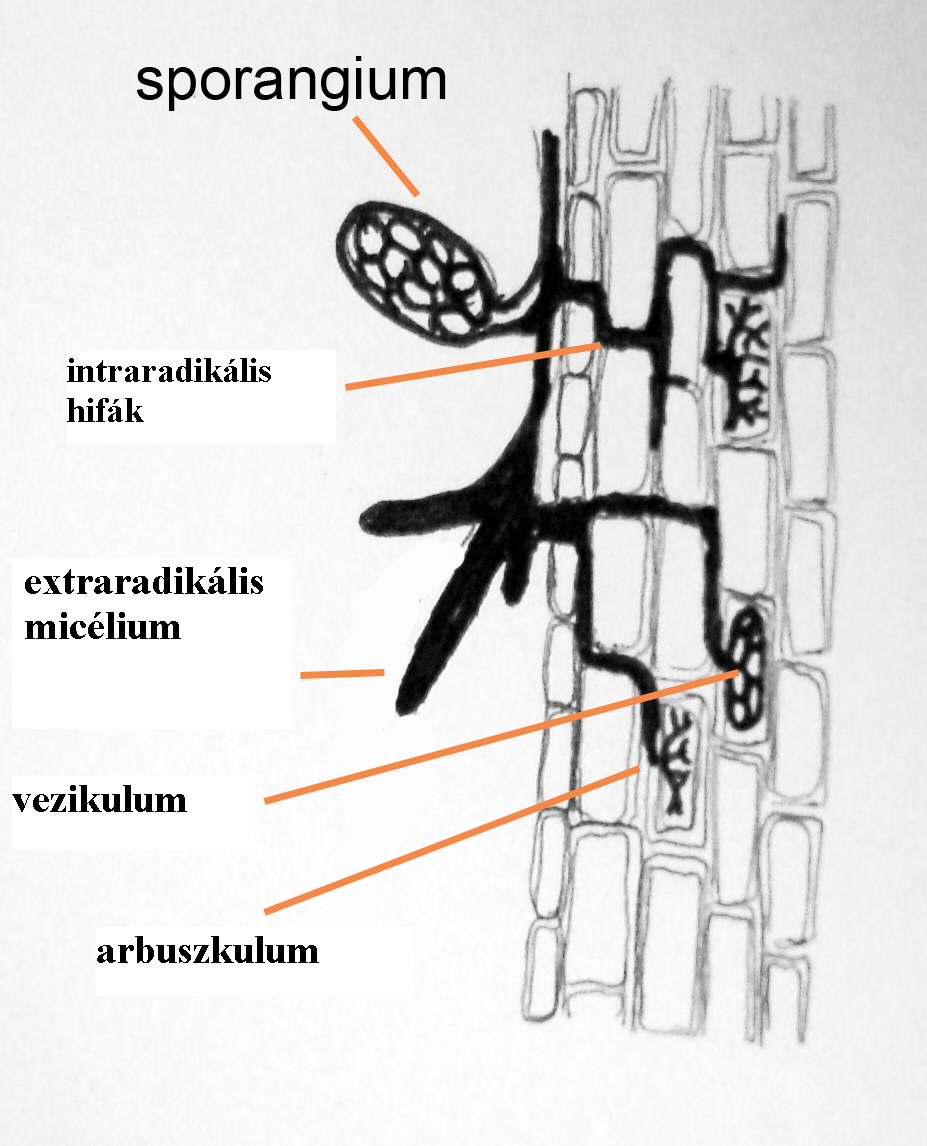 Az arbuszkuláris mikorrhiza morfológiai képletei.